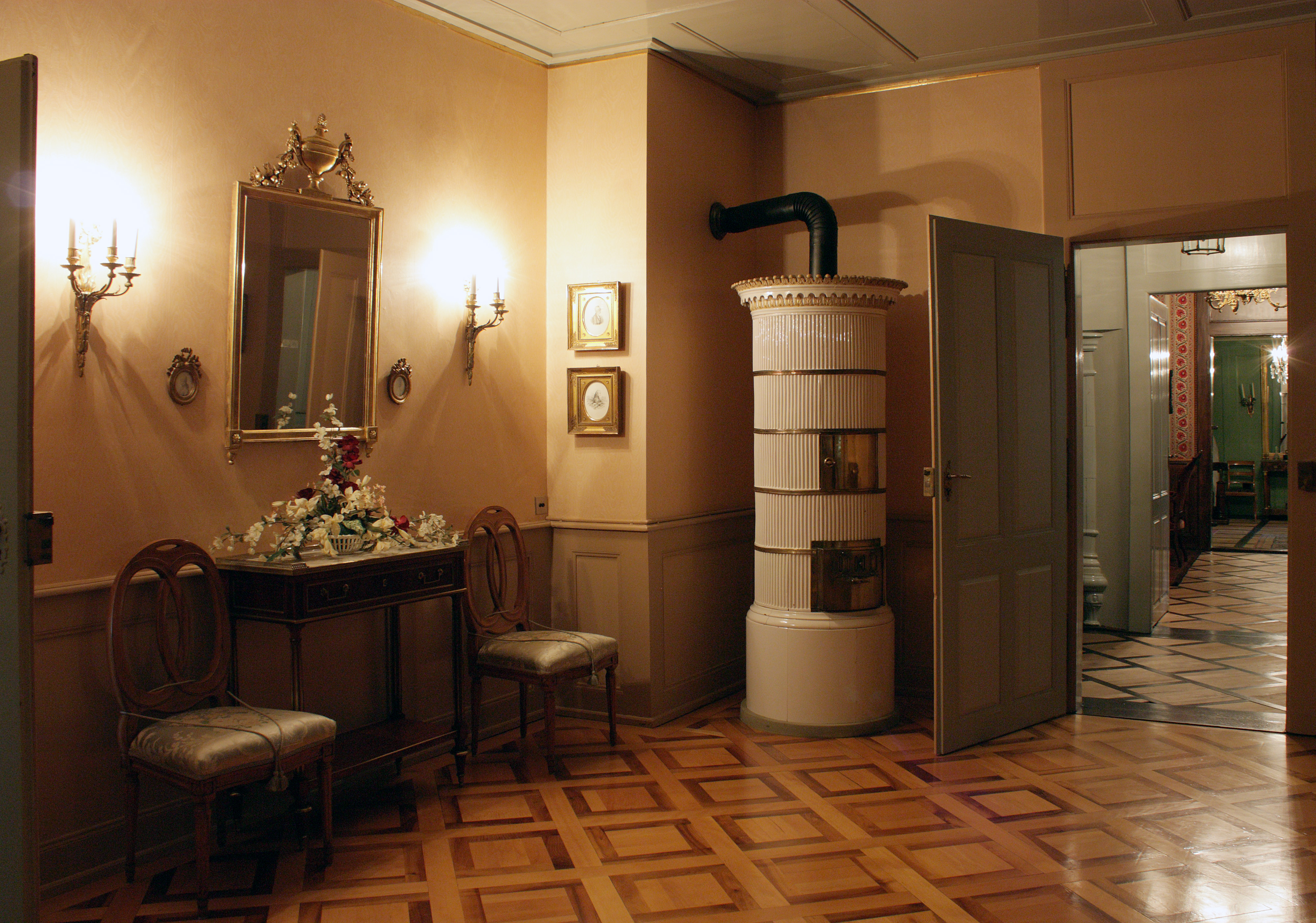 Photographie de l'appartement historique, habitat bourgeois du 19e siècle, visible au NMB Nouveau Musée Bienne. Photo: Patrick Weyeneth